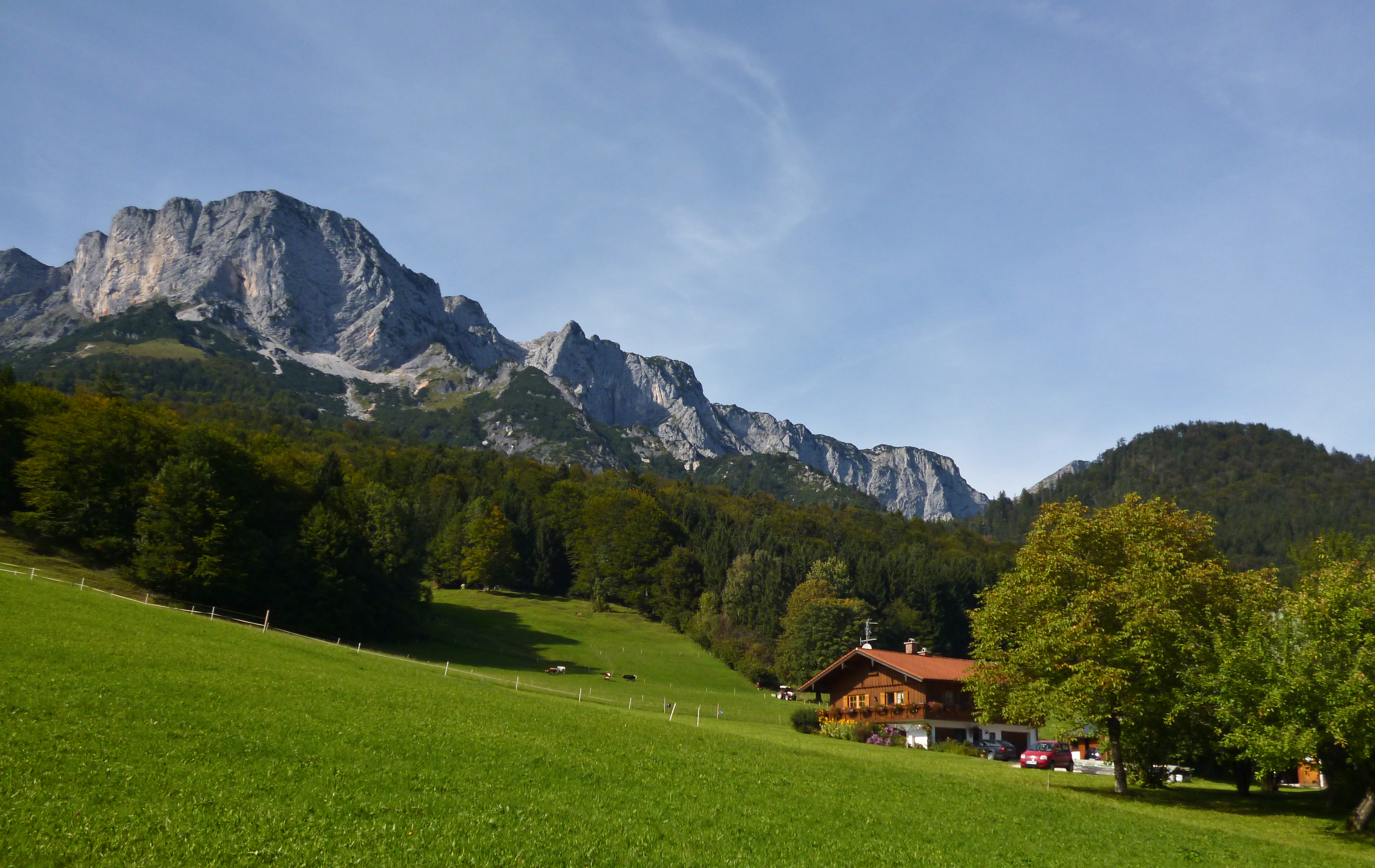 Blick vom Winkl in Hinterettenberg hinauf auf die Ostabstürze des Untersbergmassivs, links oben im Bild der Berchtesgadener Hochthron